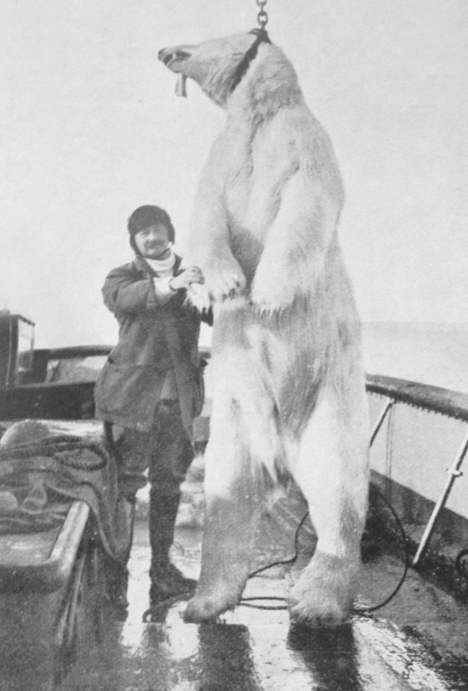 El decimoséptimo duque de Medinaceli en su expedición al Polo Norte con Hernando Fitz-James Stuart, decimocuarto duque de Peñaranda de Duero (foto de ABC)